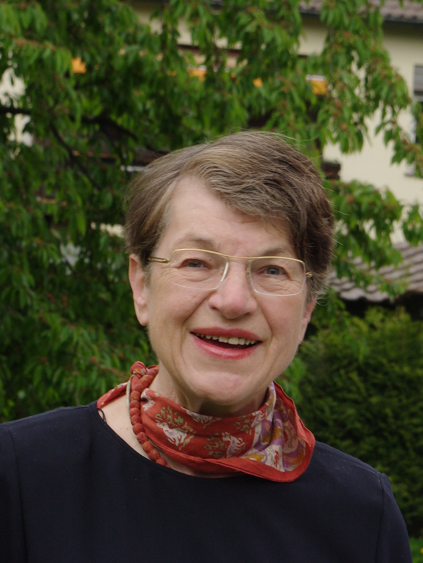 Bild der ehemaligen Bundestagsabgeordneten Sigrun Löwisch